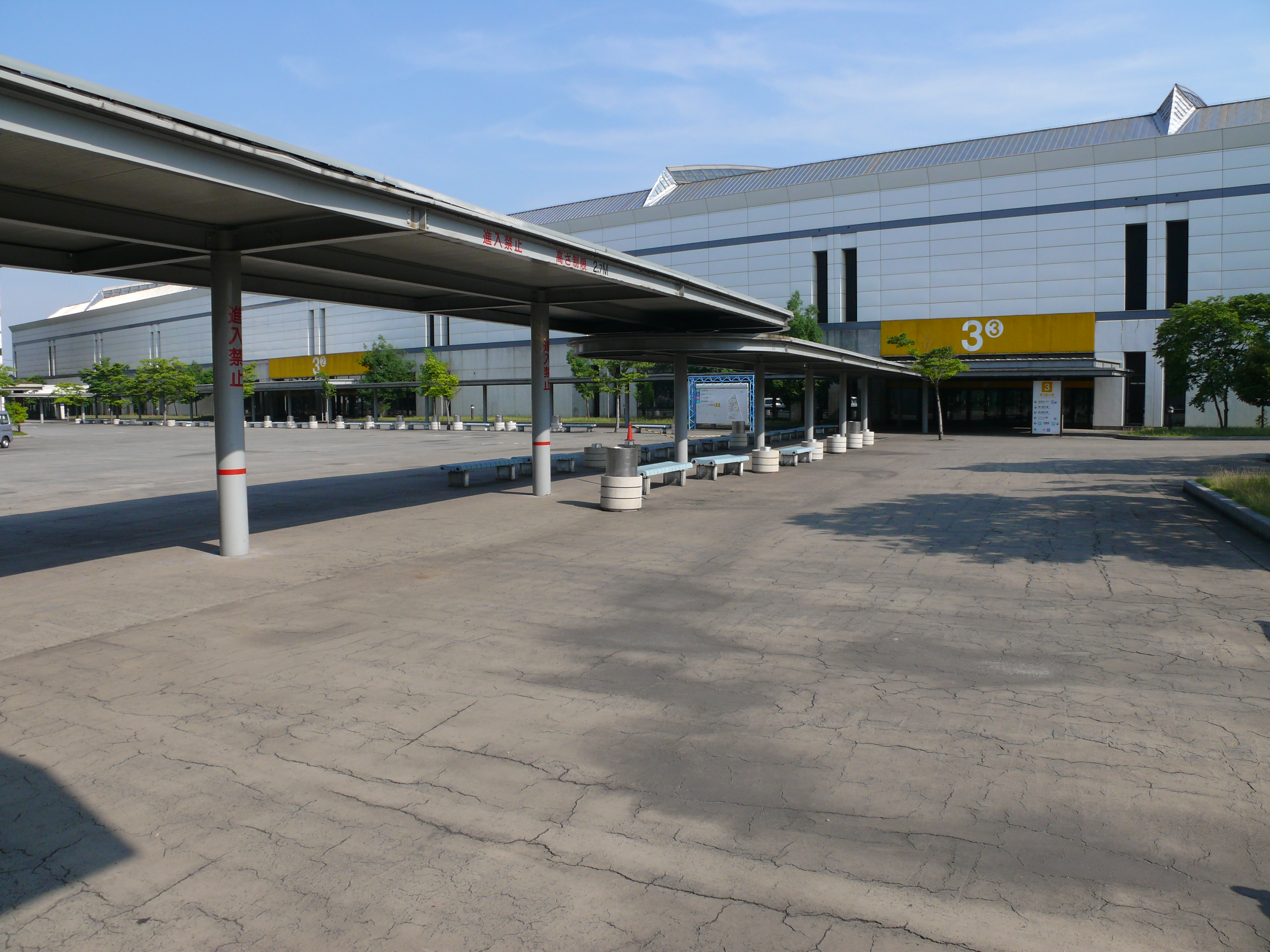 愛知県名古屋市港区にある名古屋市国際展示場（ポートメッセなごや）の第3展示館。